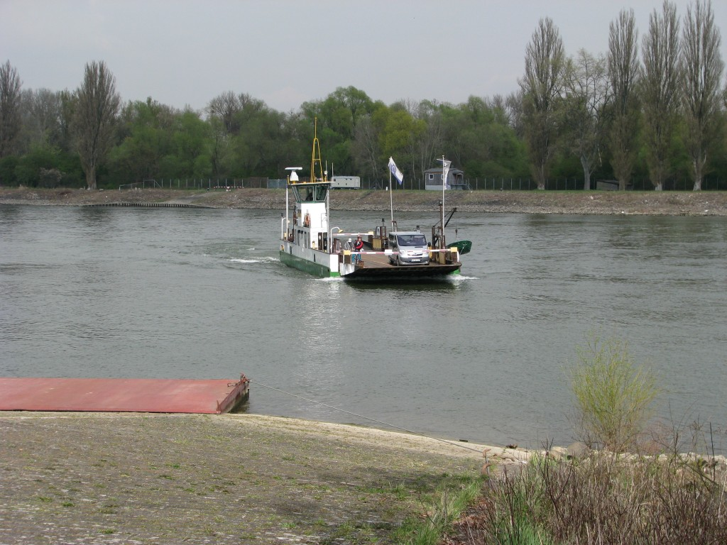 Kollerfähre in Brühl